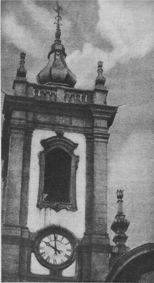 Reprodução de antiga foto do campanário da Igreja de São Francisco de Paula, no Rio de Janeiro